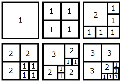 Susunan persegi masalah "Selimut Ny. Perkins" (Mrs. Perkins's quilt) dengan panjang sisi persegi besar 1-6.